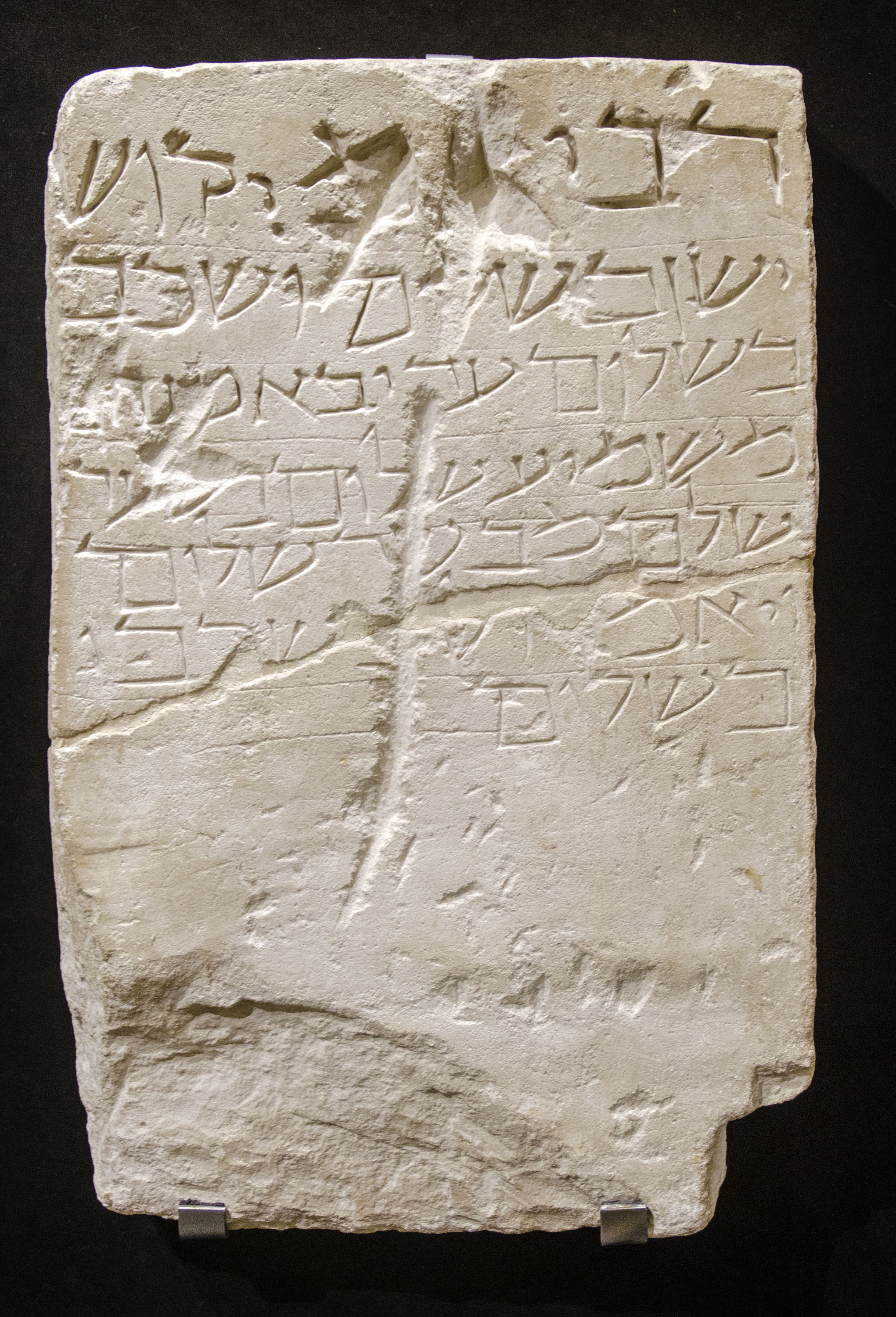 Lápìda con una inscripción en hebreo, grabada en caliza y datada en el siglo XII. Se encontró en la calle de Santiago de Lucena en 1958.